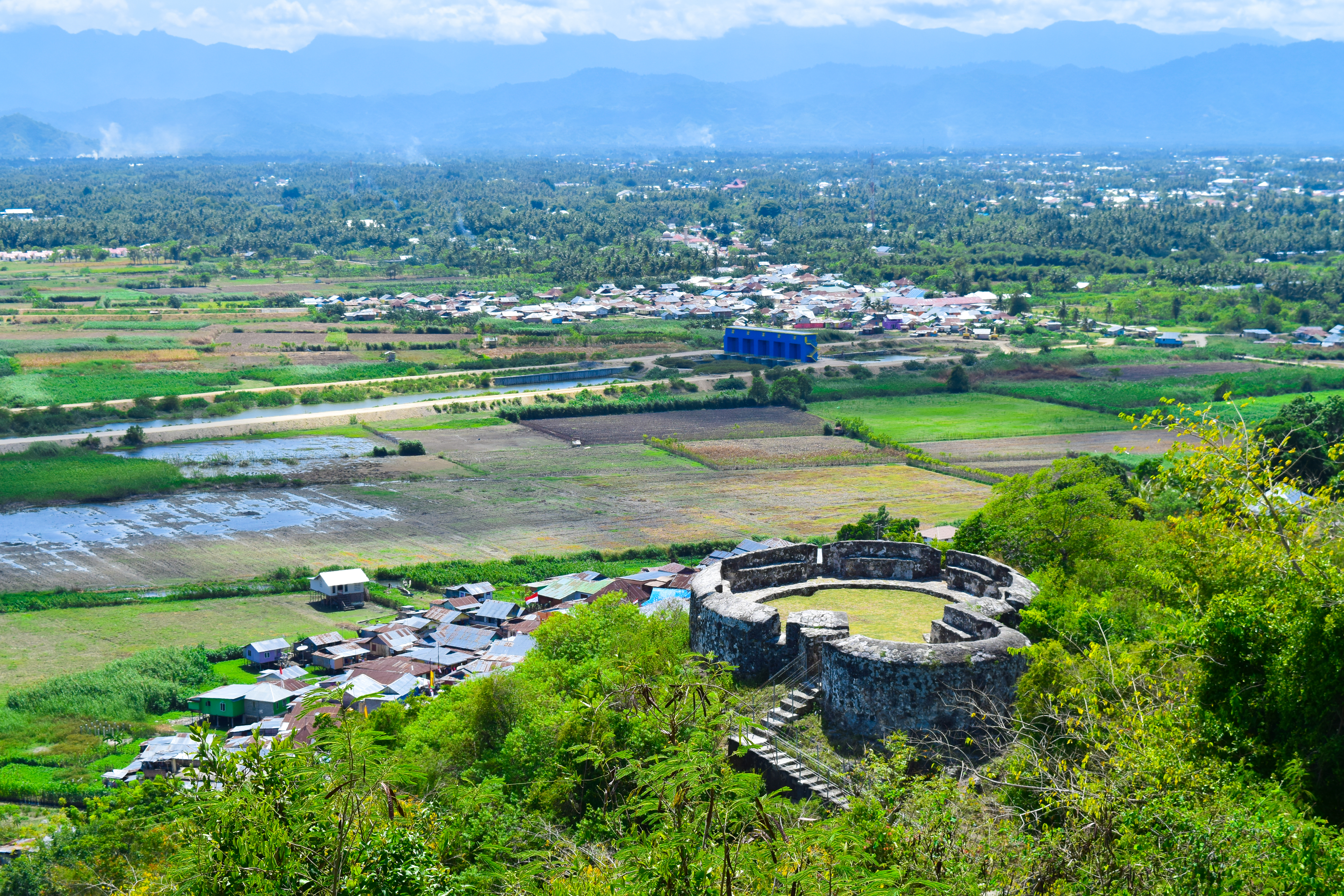 Benteng Ulupahu adalah bagian dari Benteng Otanaha selain Benteng Otahiya